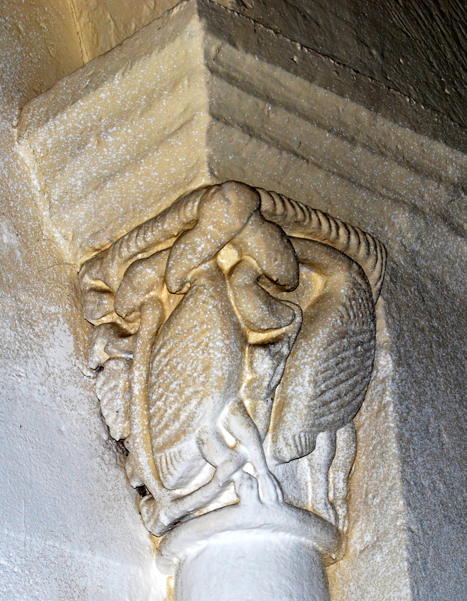 Chapiteaux de l'église Notre-Dame de Lestiac-sur-Garonne